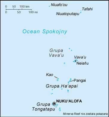 Mapa Tonga, na podstawie CIA World Factbook